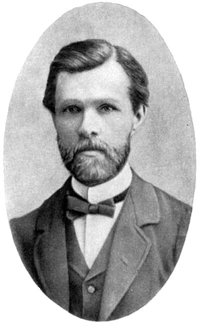 Нечуй-Левицький Іван Семенович: 1892-й: Нечуй-Левицький уже сім років на пенсії, живе в Києві.